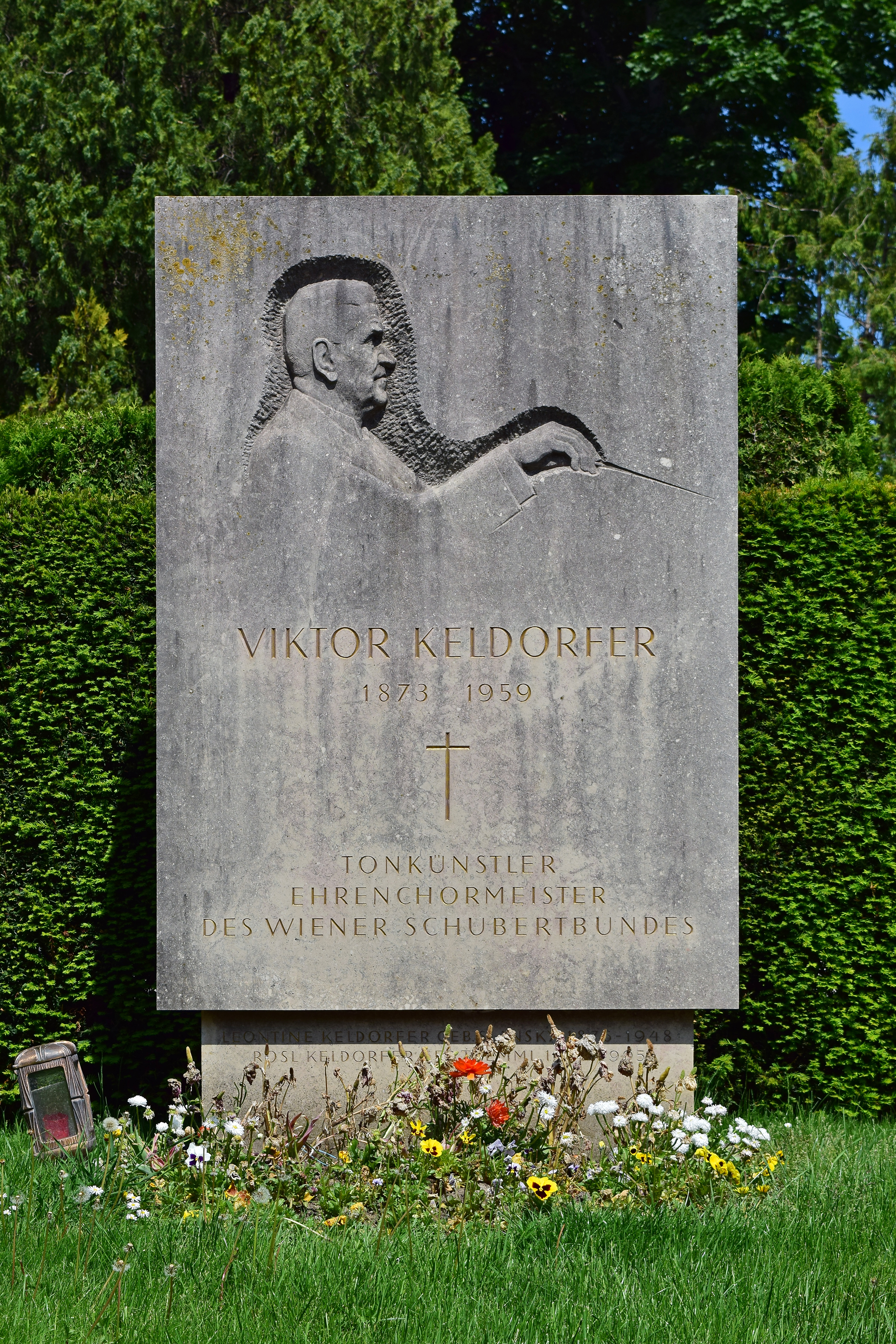 Ehrengrab von Viktor Keldorfer auf dem Wiener Zentralfriedhof.